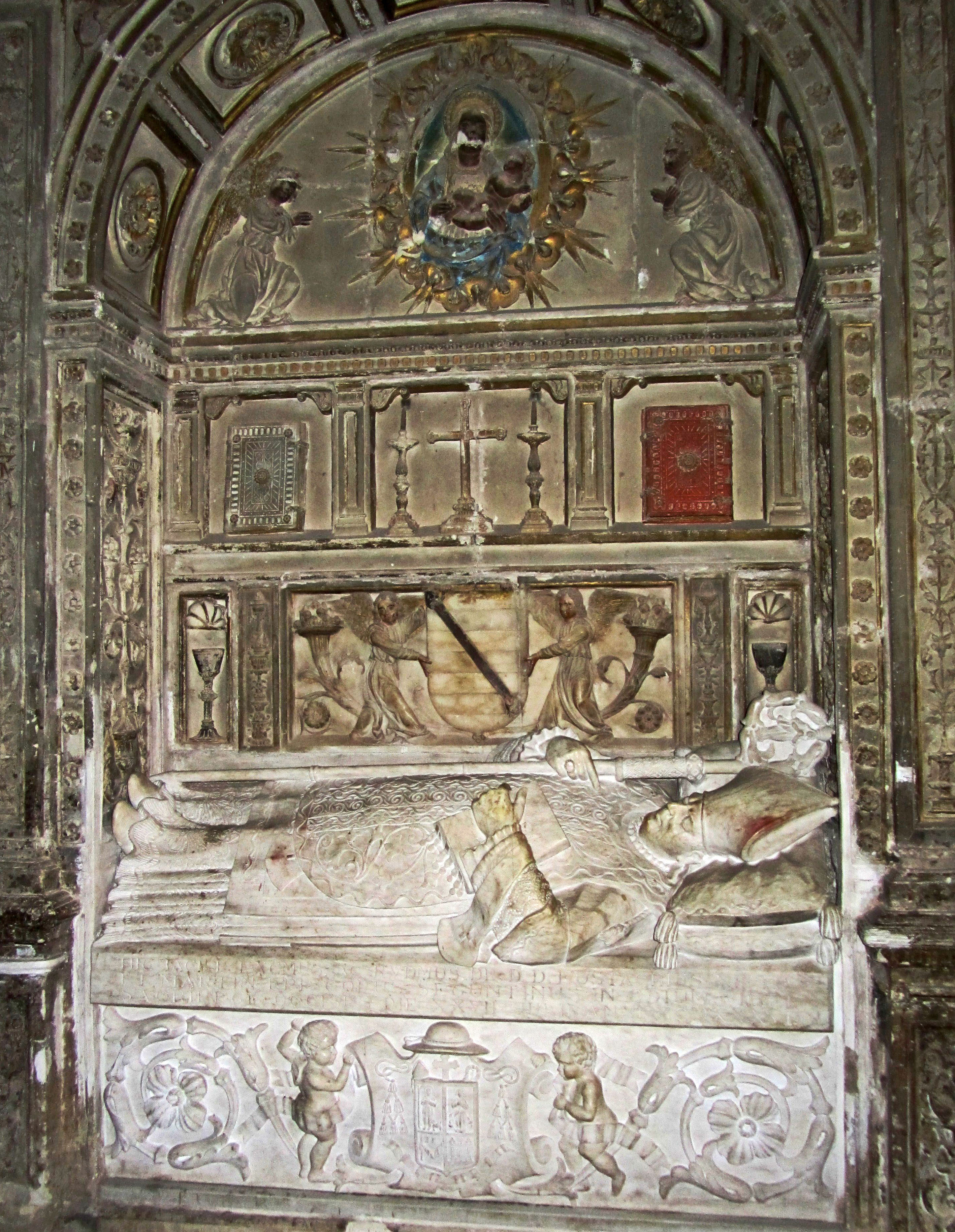 Sepulcro del obispo Eustaquio Nieto y Martin en la catedral de Sigüenza.Spain